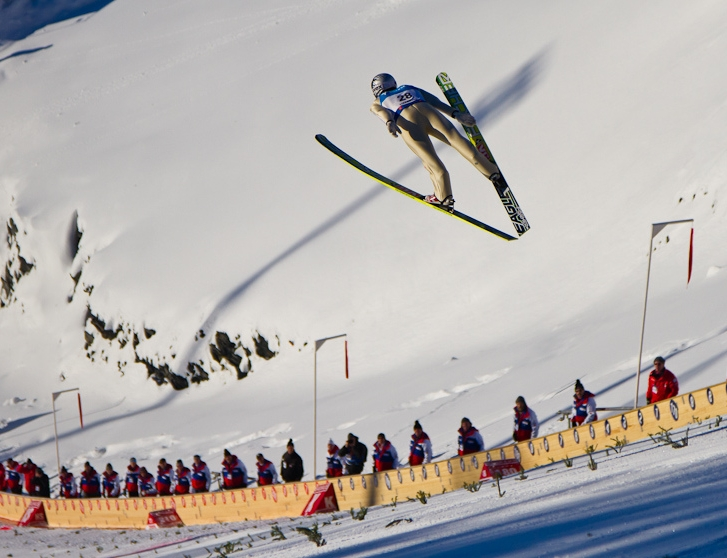 Anders Jacobsen